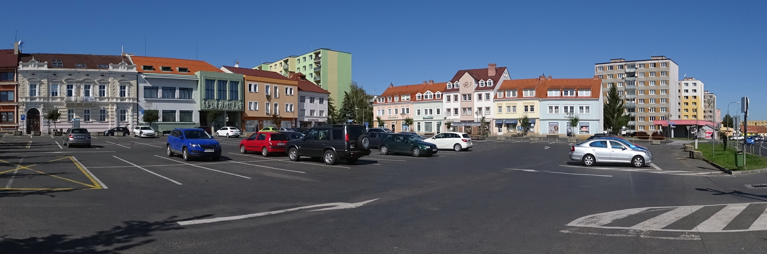 Panorama severní části Masarykova náměstí v Přešticích.